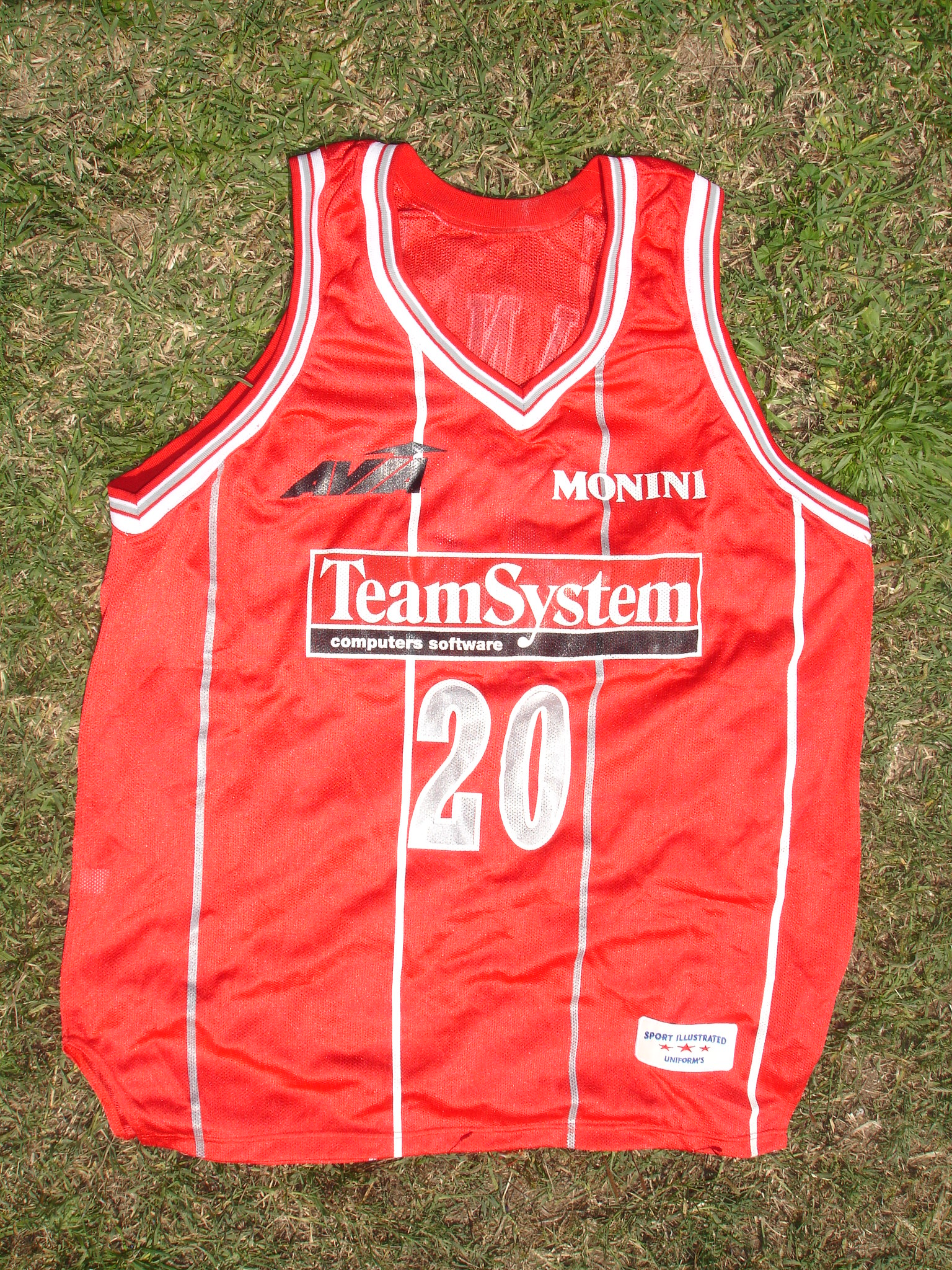 Canotta della TeamSystem della stagione 1994-1995, unico anno in cui il Basket Rimini ha avuto quello sponsor.